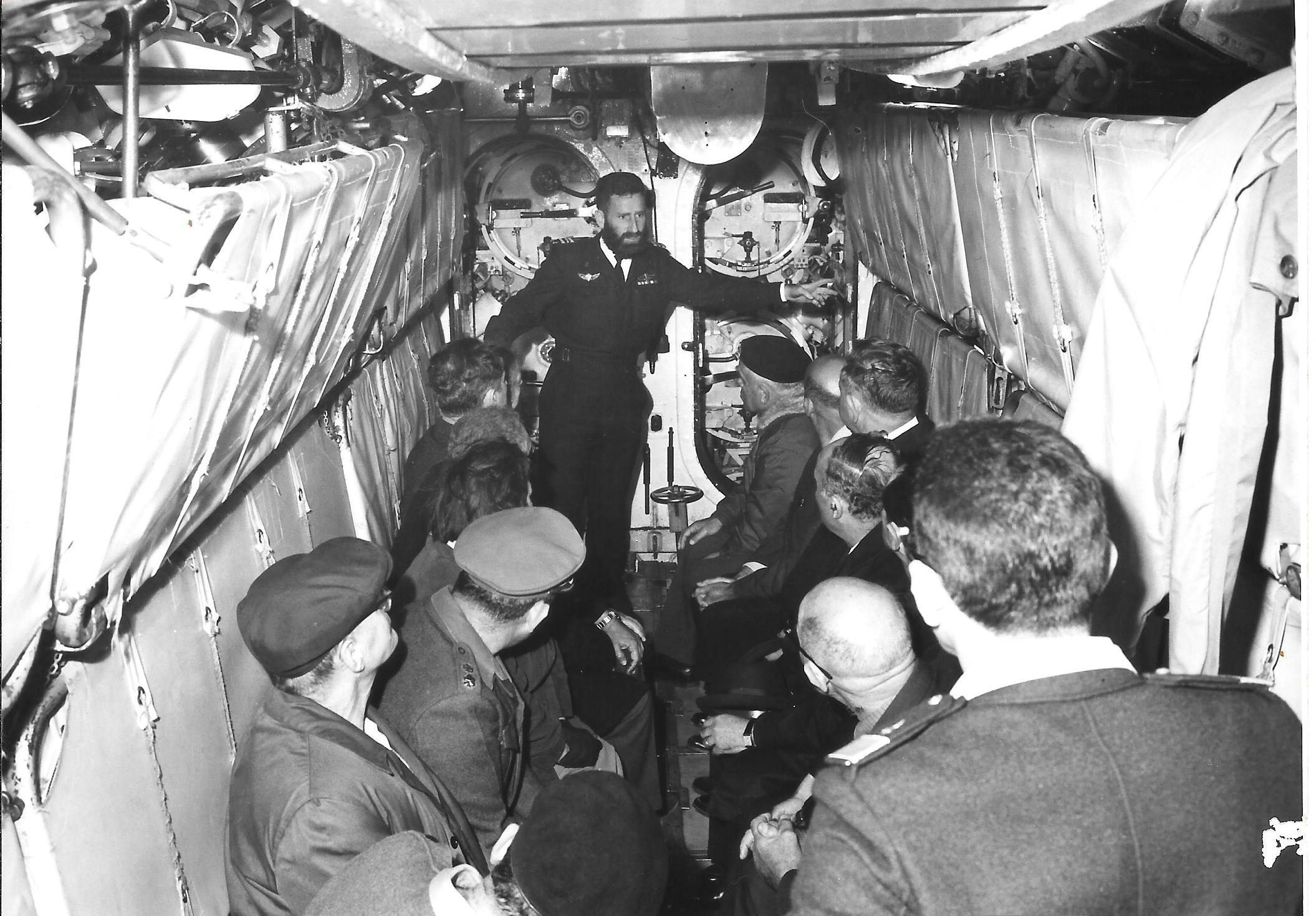 ביקור ועדת החוץ והביטחון של הכנסת בצוללת אח"י דולפין צ-79 מסביר אברהם דרור מפקד הצוללת 1968.